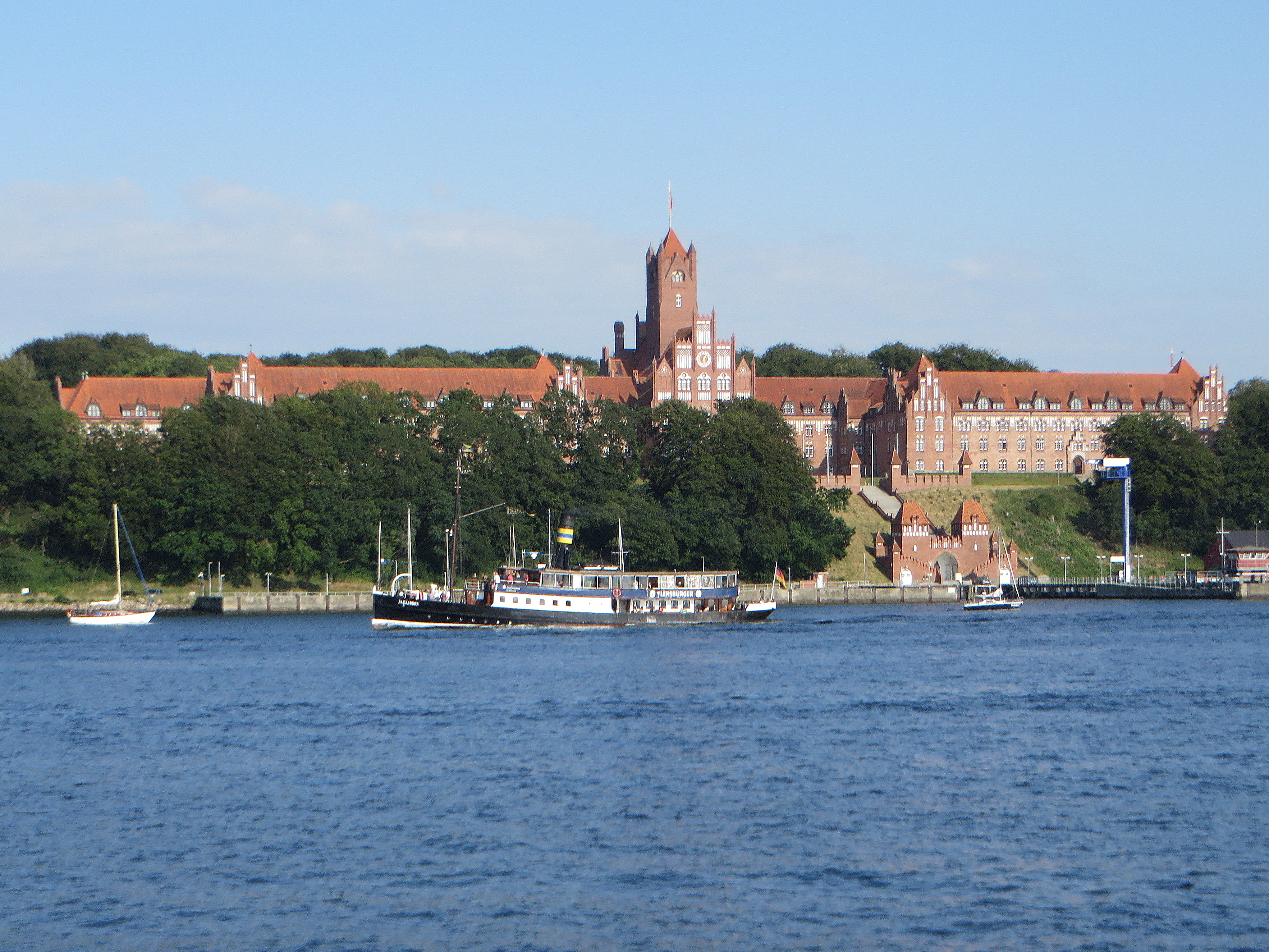 Alexandra vor dem Roten Schloss (Flensburg-Mürwik 2015), Bild 05; Bild entstand während des Dampf Rundums 2015